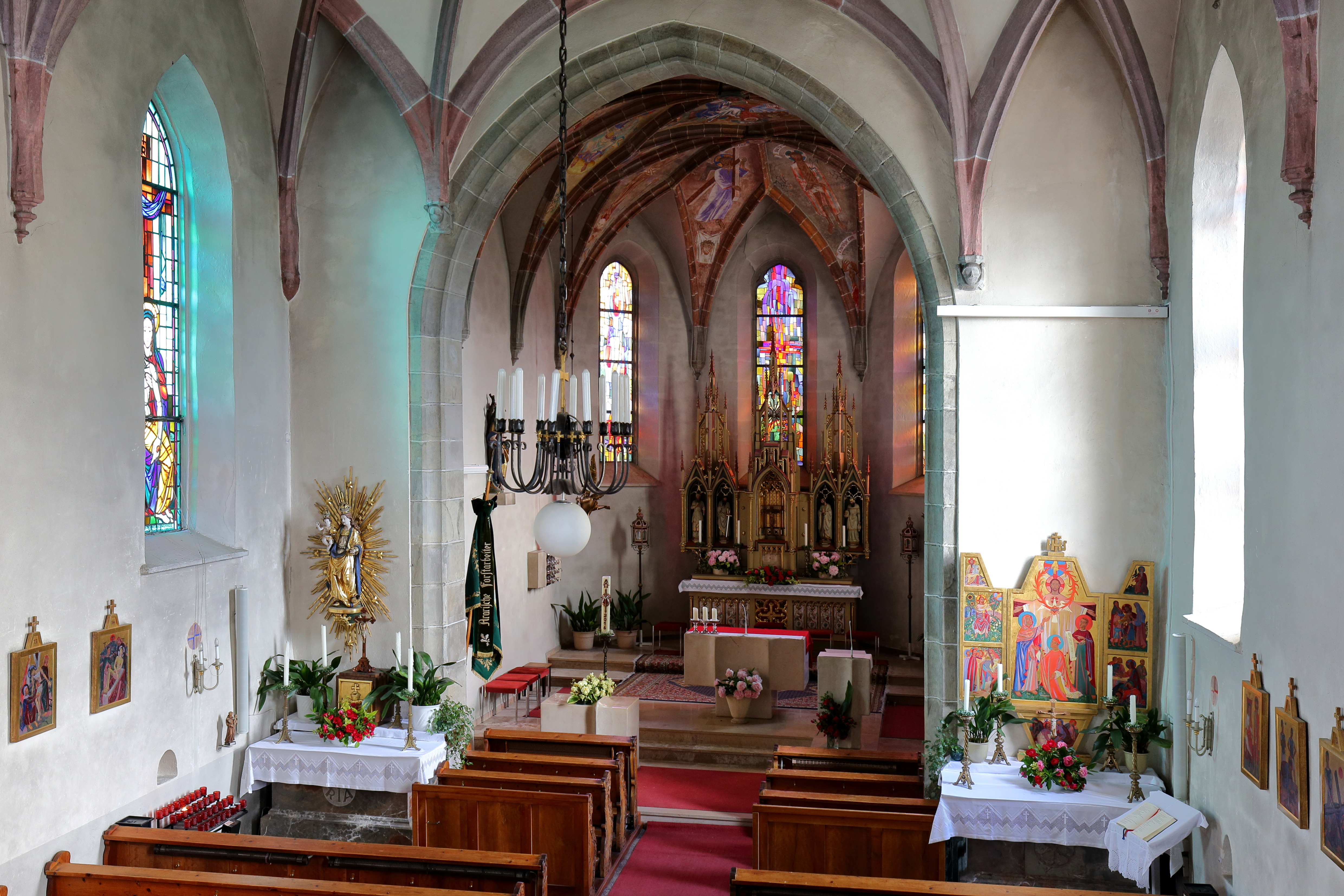 Blick Richtung Altarraum in der röm.-kath. Pfarrkirche hl. Valentin in der oberösterreichischen Gemeinde Weyregg am Attersee.Die spätgotische Kirche wurde in der zweiten Hälfte des 15. Jahrhunderts errichtet und 1931/1933 umgebaut sowie erweitert. Die Deckenmalerei im Altarraum (1951/52) sowie die Glasfenster (1972) und den rechten Seitenaltar, ein Flügelaltar aus dem Jahr 1953, hat Karl Weiser gestaltet.